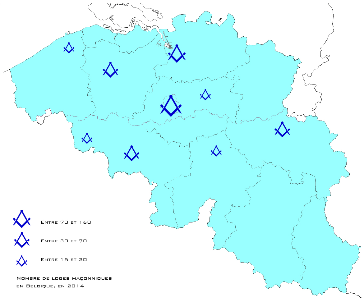 Carte estimant le nombre de loges maçonniques en Belgique. Travail personnel réalisé à partir de certains chiffres d'obédiences en 2014 et de données disponibles sur l'article Franc-maçonnerie en Belgique (nl). La carte est informelle et a pour seule ambition un aperçu du paysage maçonnique belge.